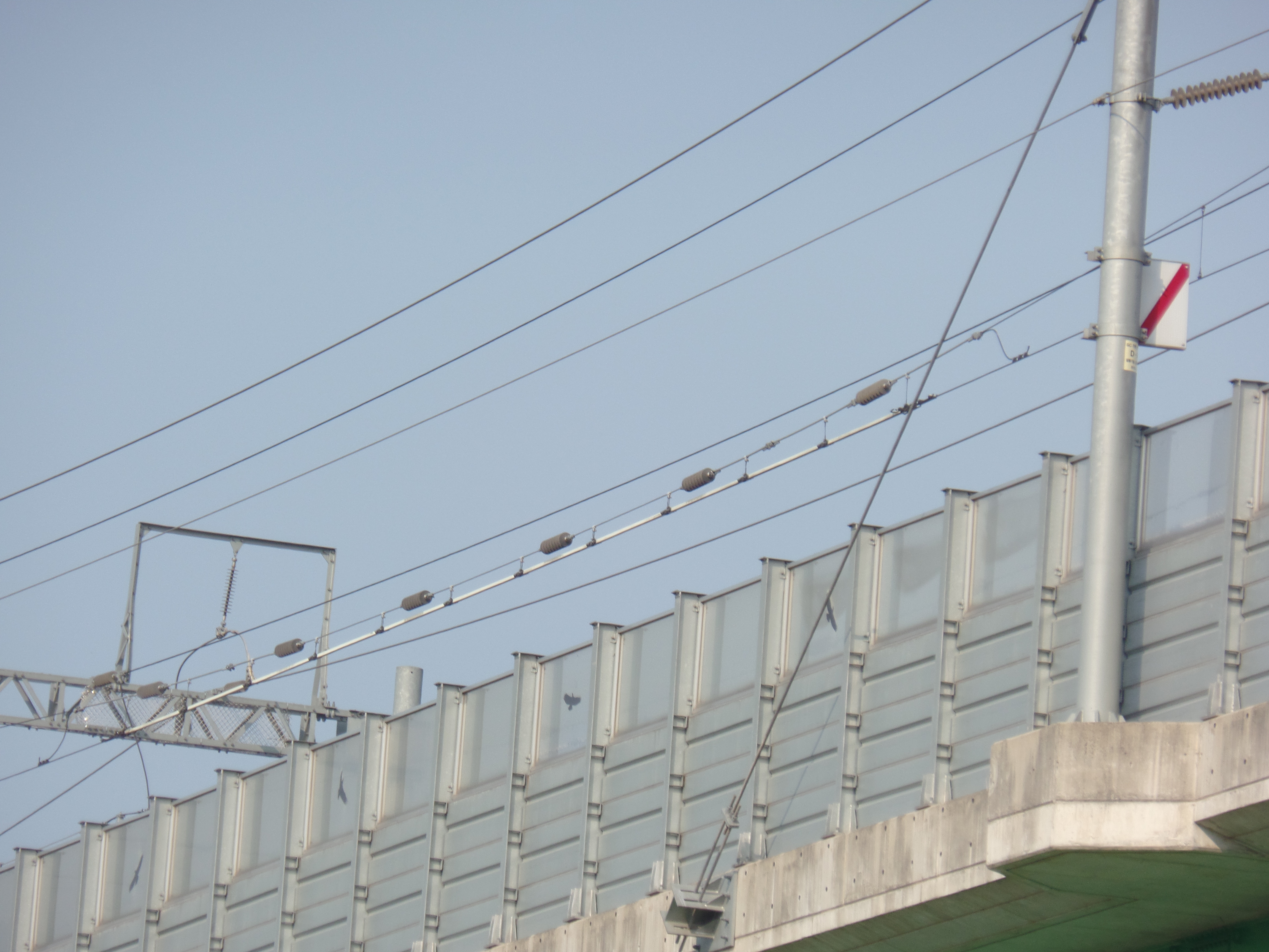 한국 전기철도의 교류-교류 절연구간